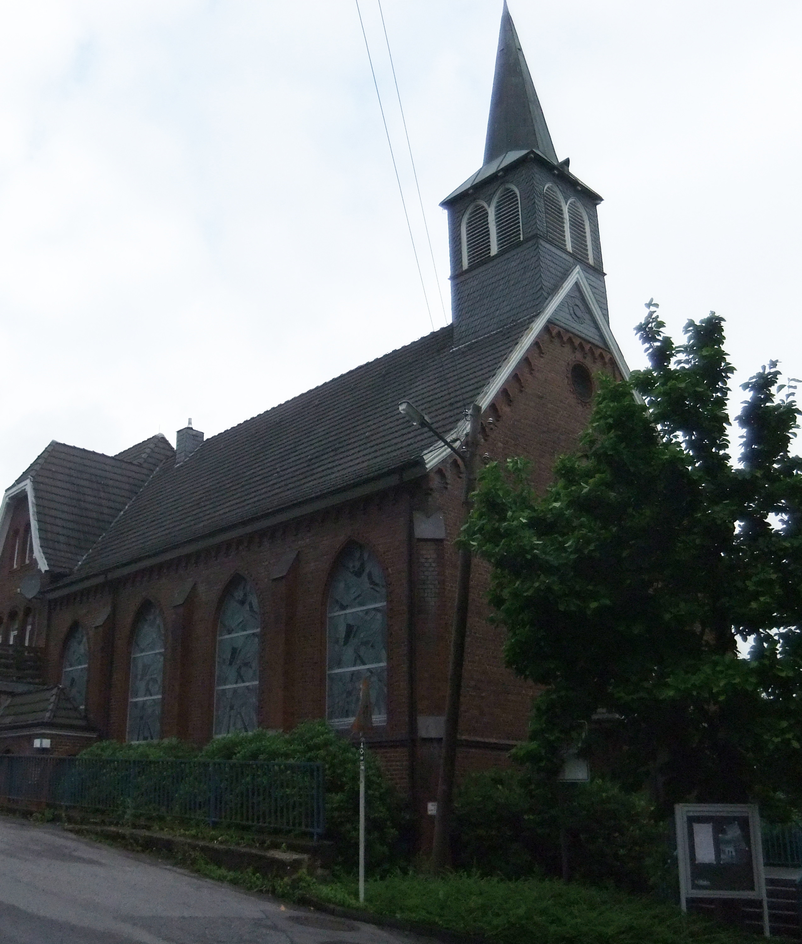 Ansichten der Laaker Kirche in Wuppertal